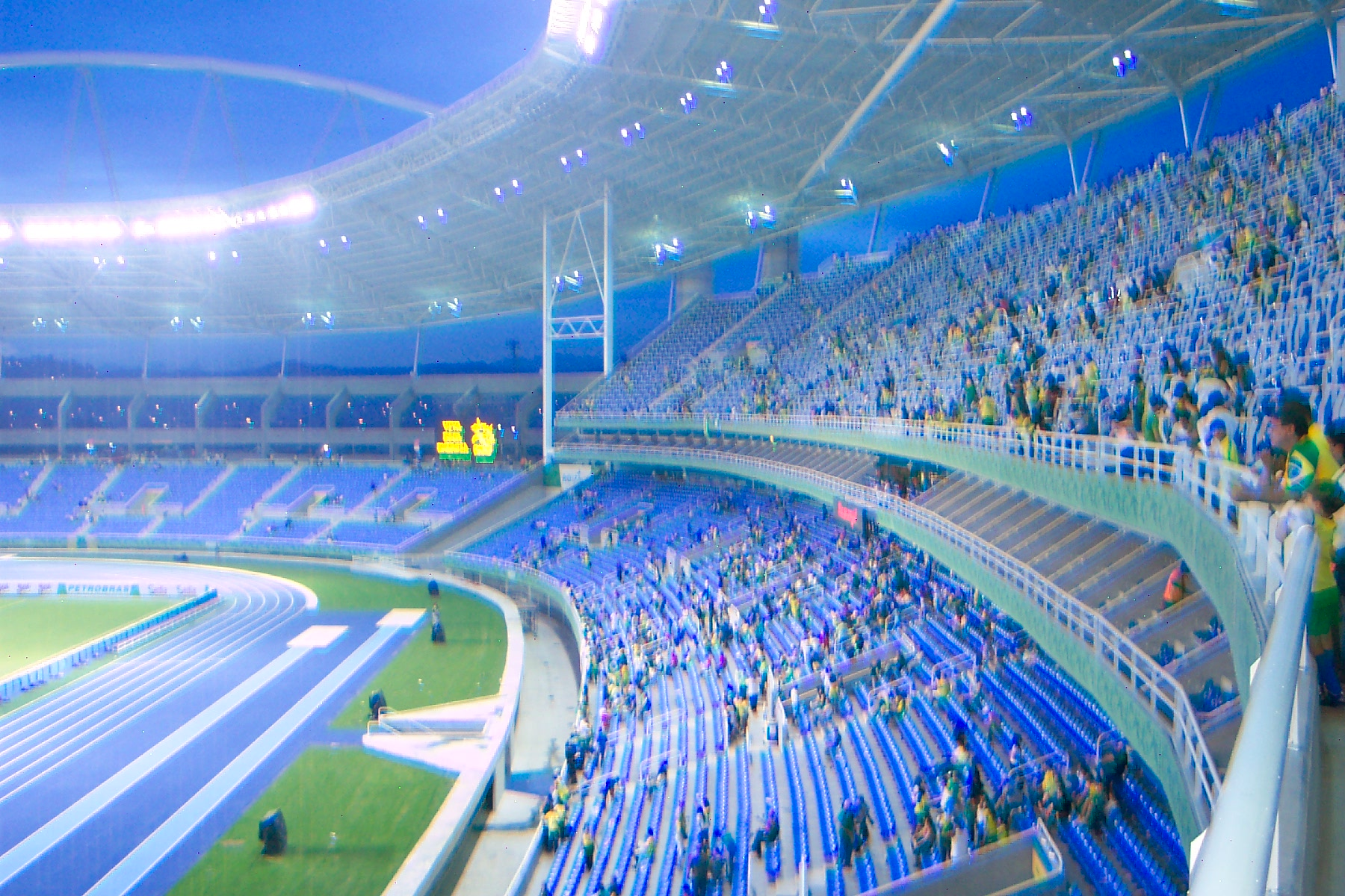 Arquibancadas do Engenhão após o jogo Brasil 2-0 Costa Rica pelo torneio masculino de futebol do Rio 2007.